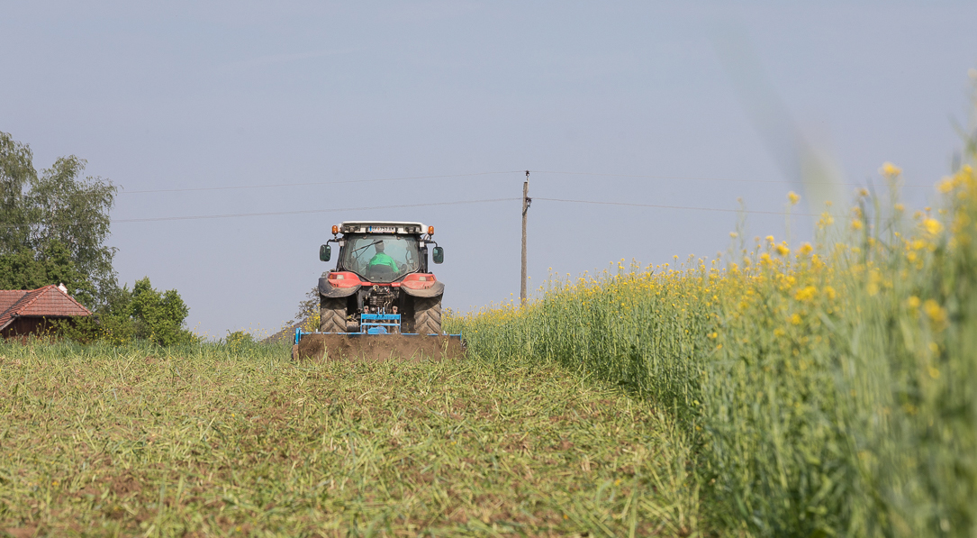 Eine wichtige Rolle in der Regenerativen Landwirtschaft kommt der Ackerfräse zu, die den dauergrünen Boden flach abschält und somit eine Flächenrotte erzeugt. Als Rottelenker werden Fermente eingesetzt.